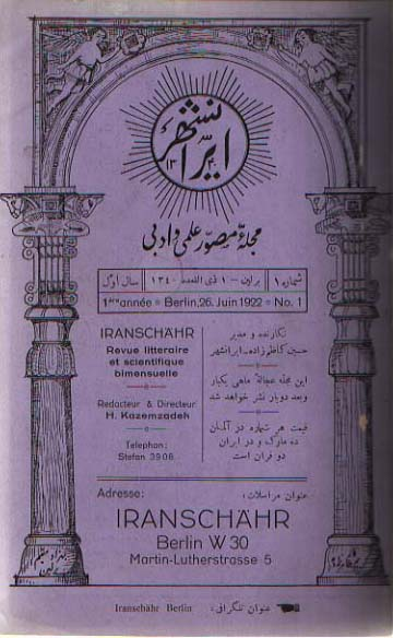 Iranschahr (Persian: ایرانشهر) magazine, 1922. By: Hossein Kazemzadeh.